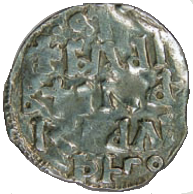 Динар Краљевића Марка (наличје)